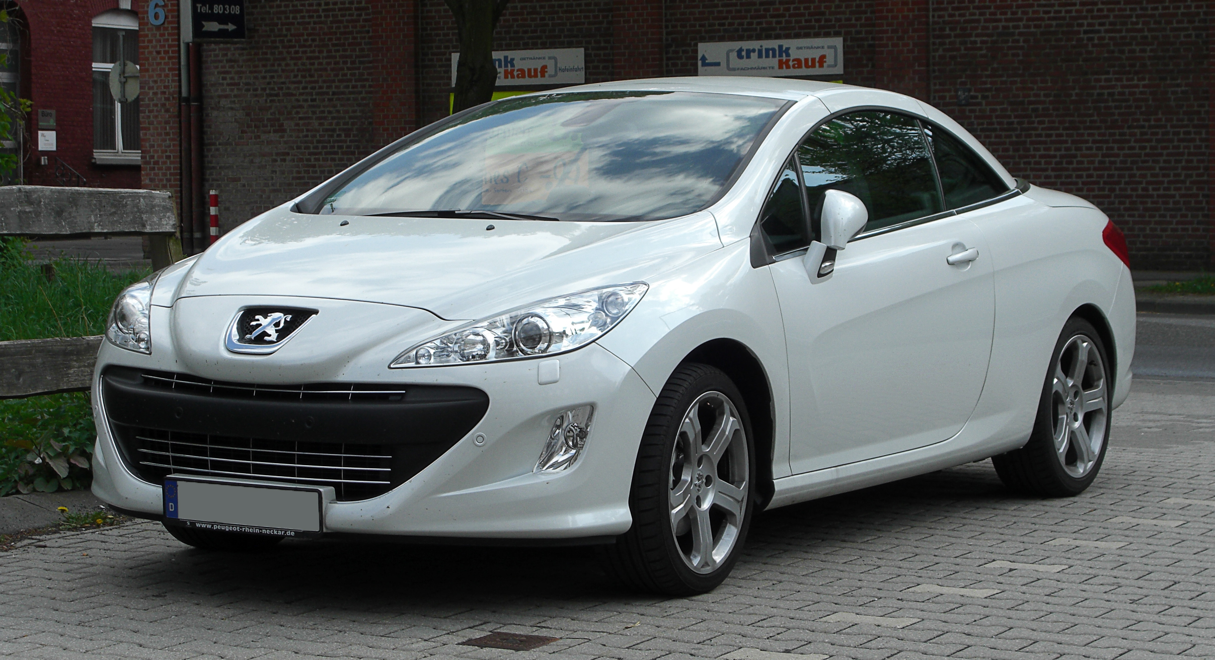 Peugeot 308 CC